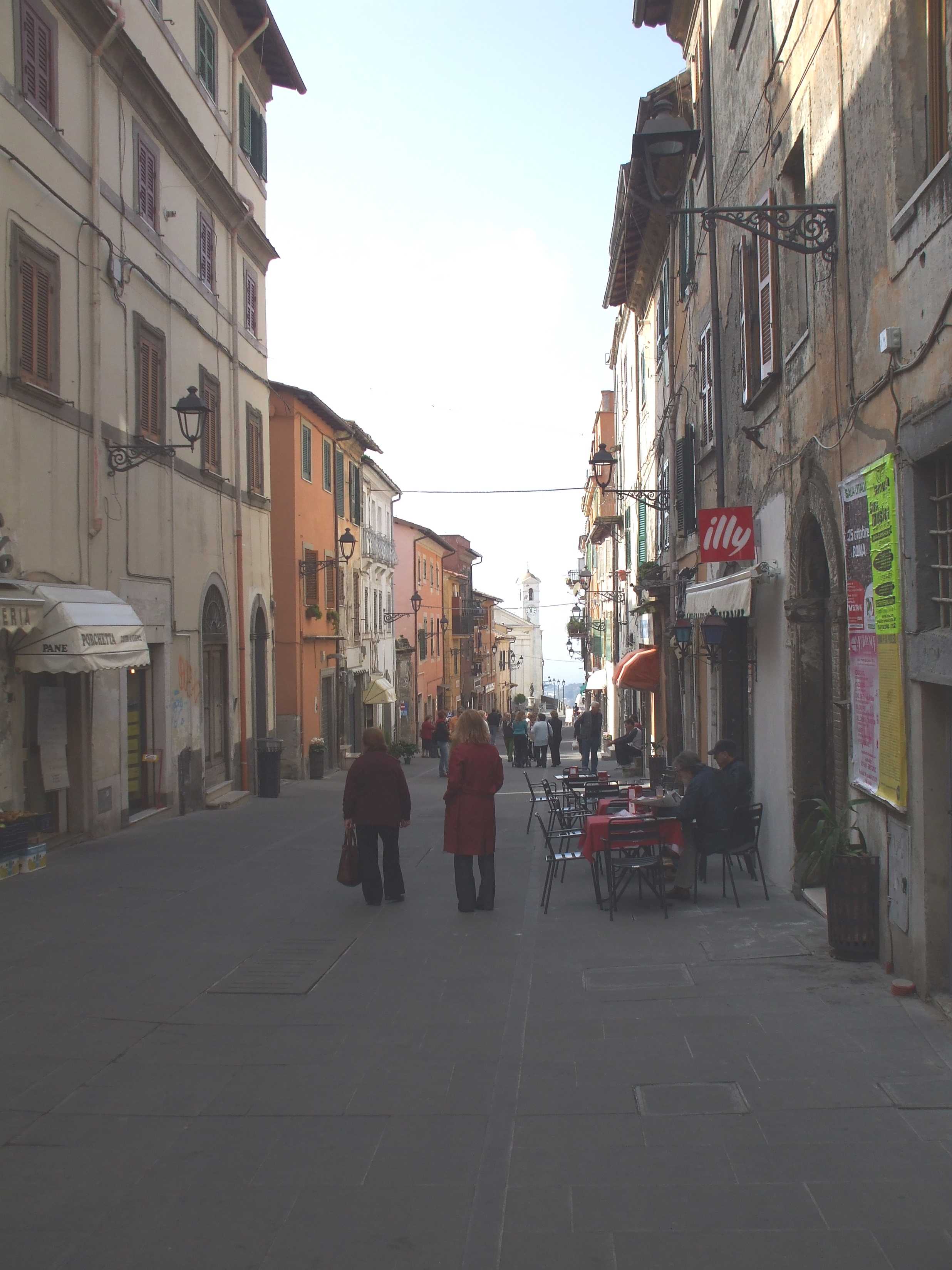 Ariccia - corso G. Garibaldi